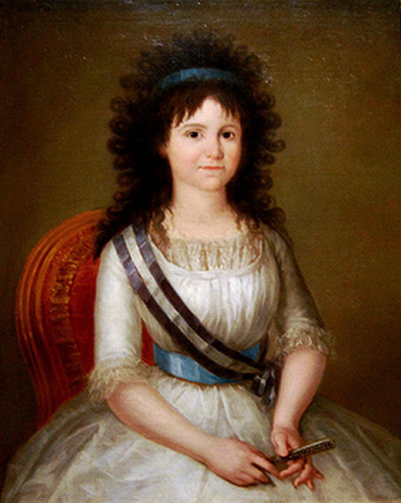 Retrato de la infanta María Luisa de Borbón